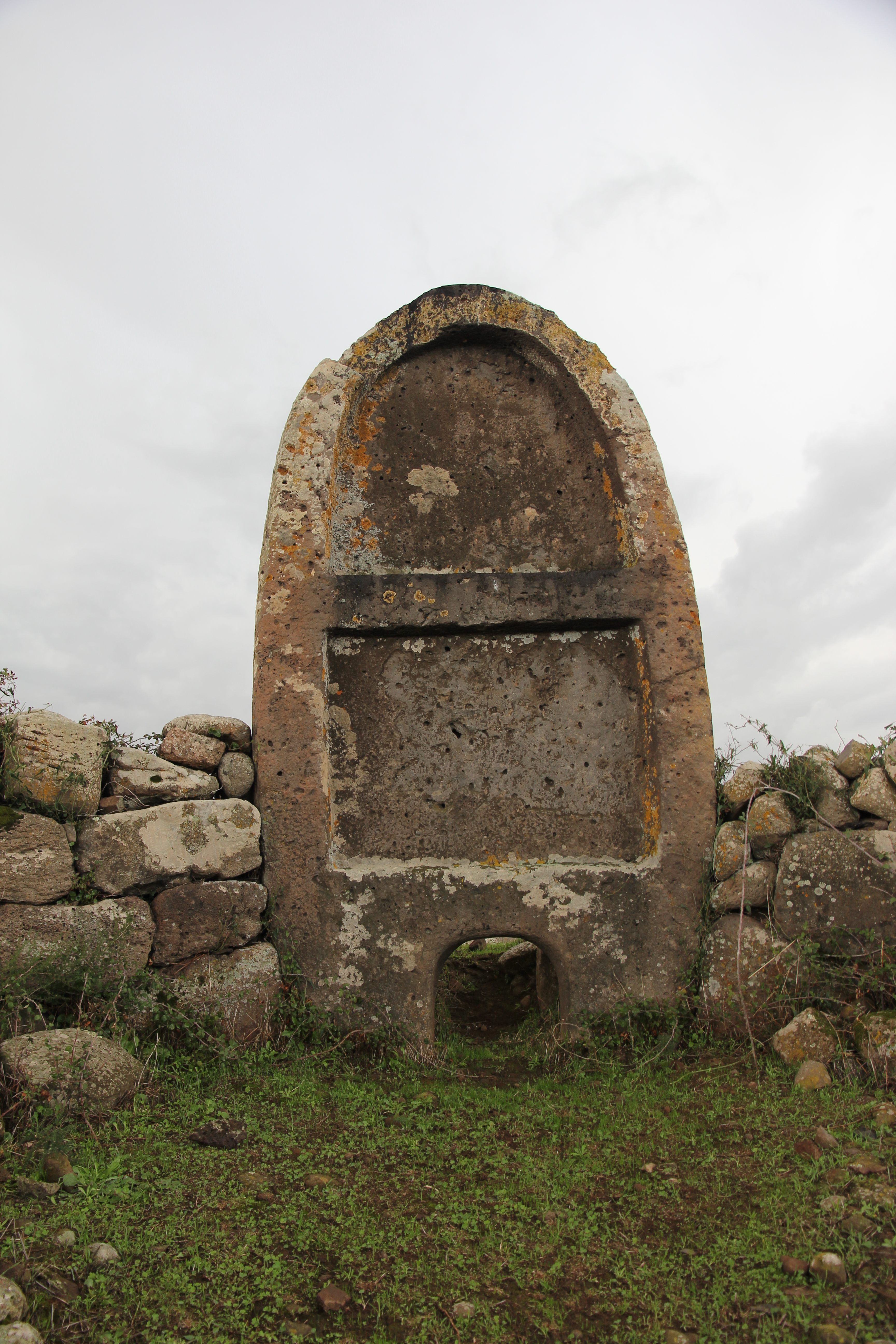 Tomba dei giganti di Imbertighe